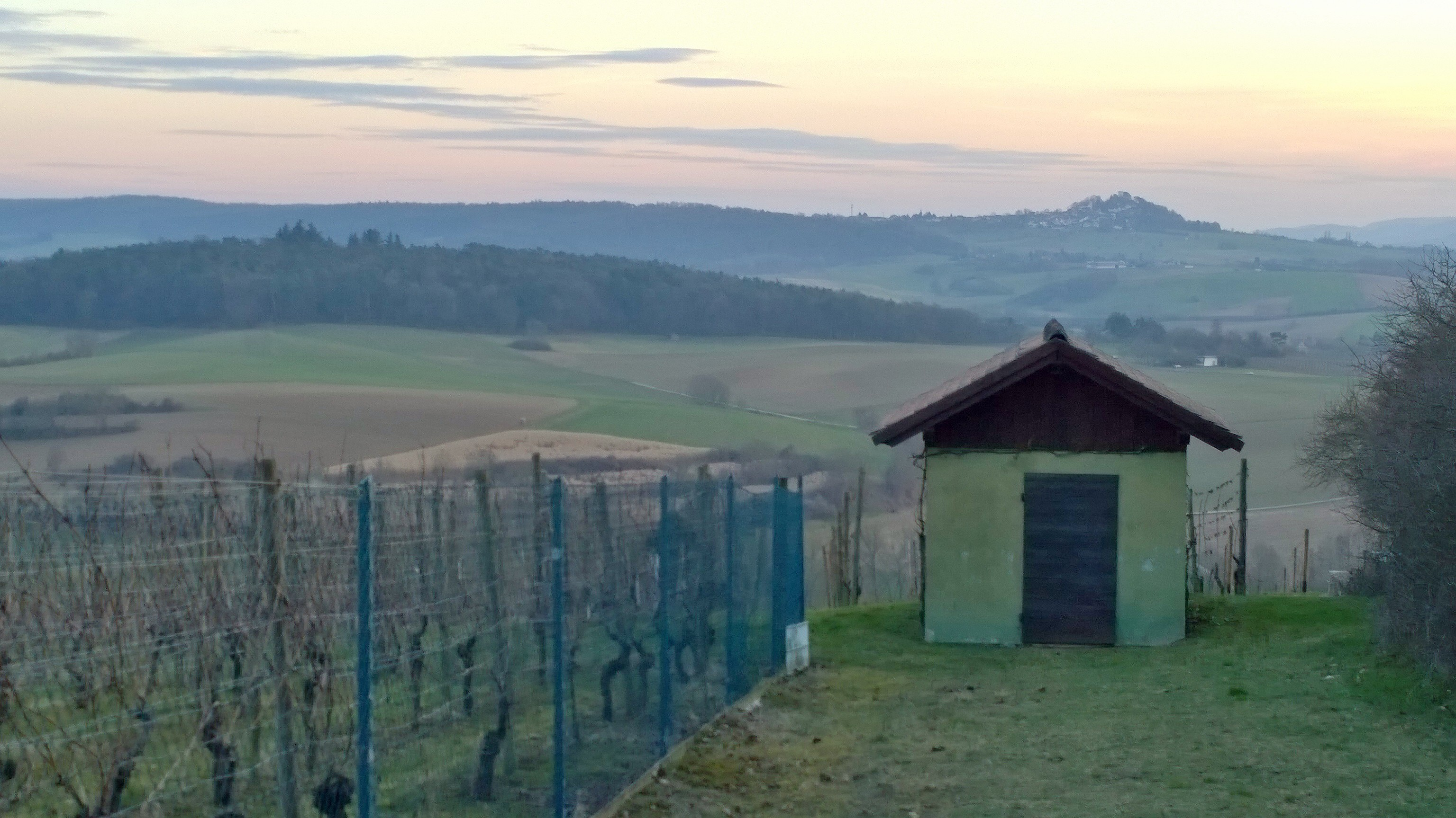 Blick vom ND "Baumgruppe Hainrichsberg" über das Groß-Umstädter Weingebiet "Einzellage Am Herrnberg" mit Winzerhäuschen vom Weinlehrpfad nach der Veste Otzberg in den Odenwald